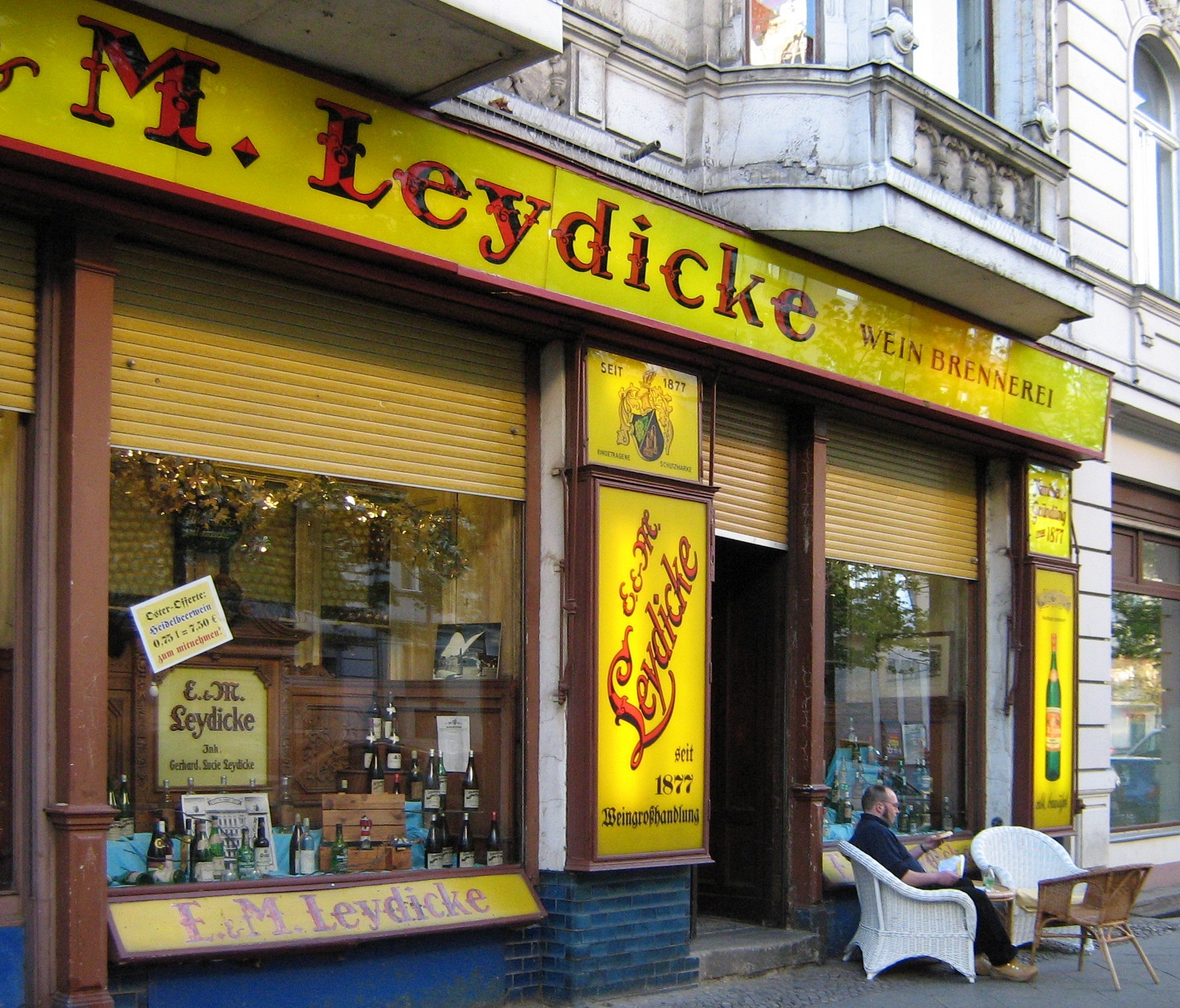 Deutschland, Berlin-Schöneberg, Mansteinstr.4: Aussenansicht Altberliner Gaststätte Leydicke